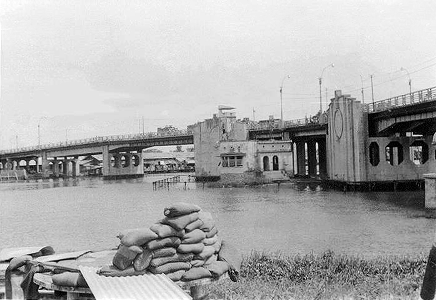 Cầu chữ Y (bridge 1968)